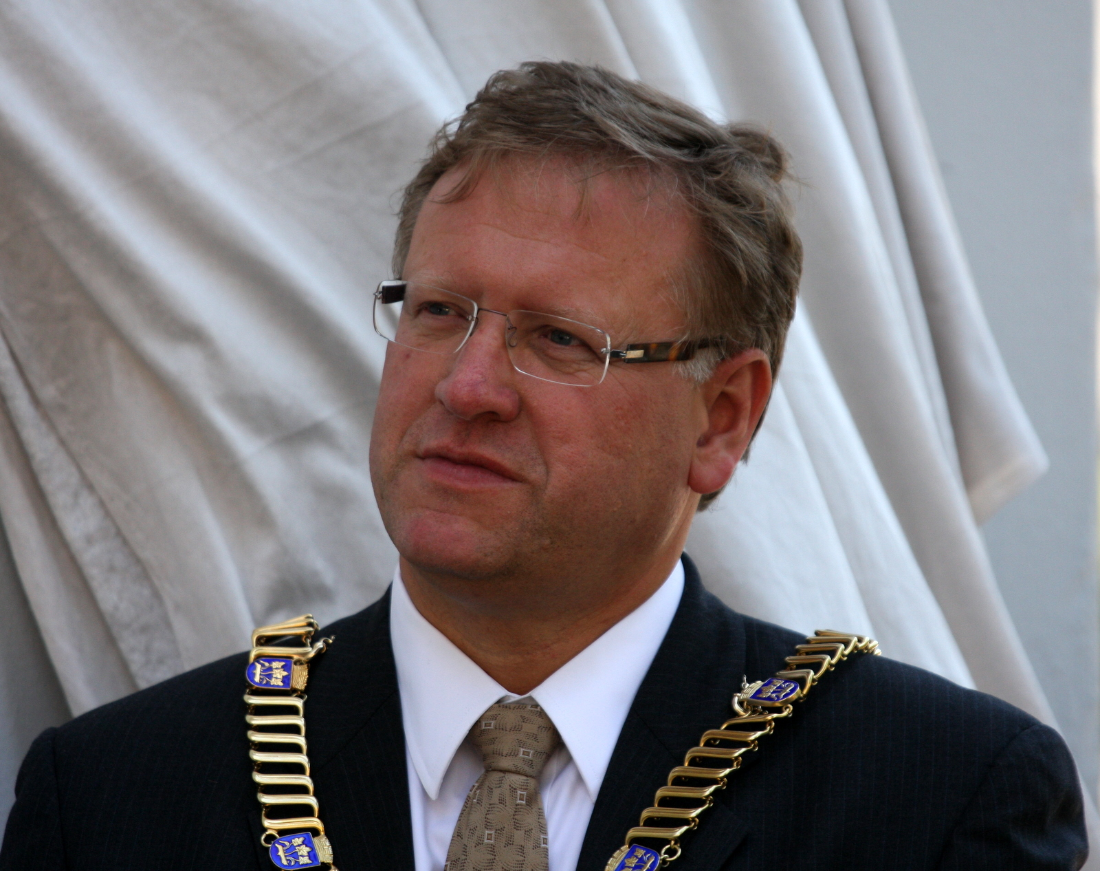 Leif Johan Sevland